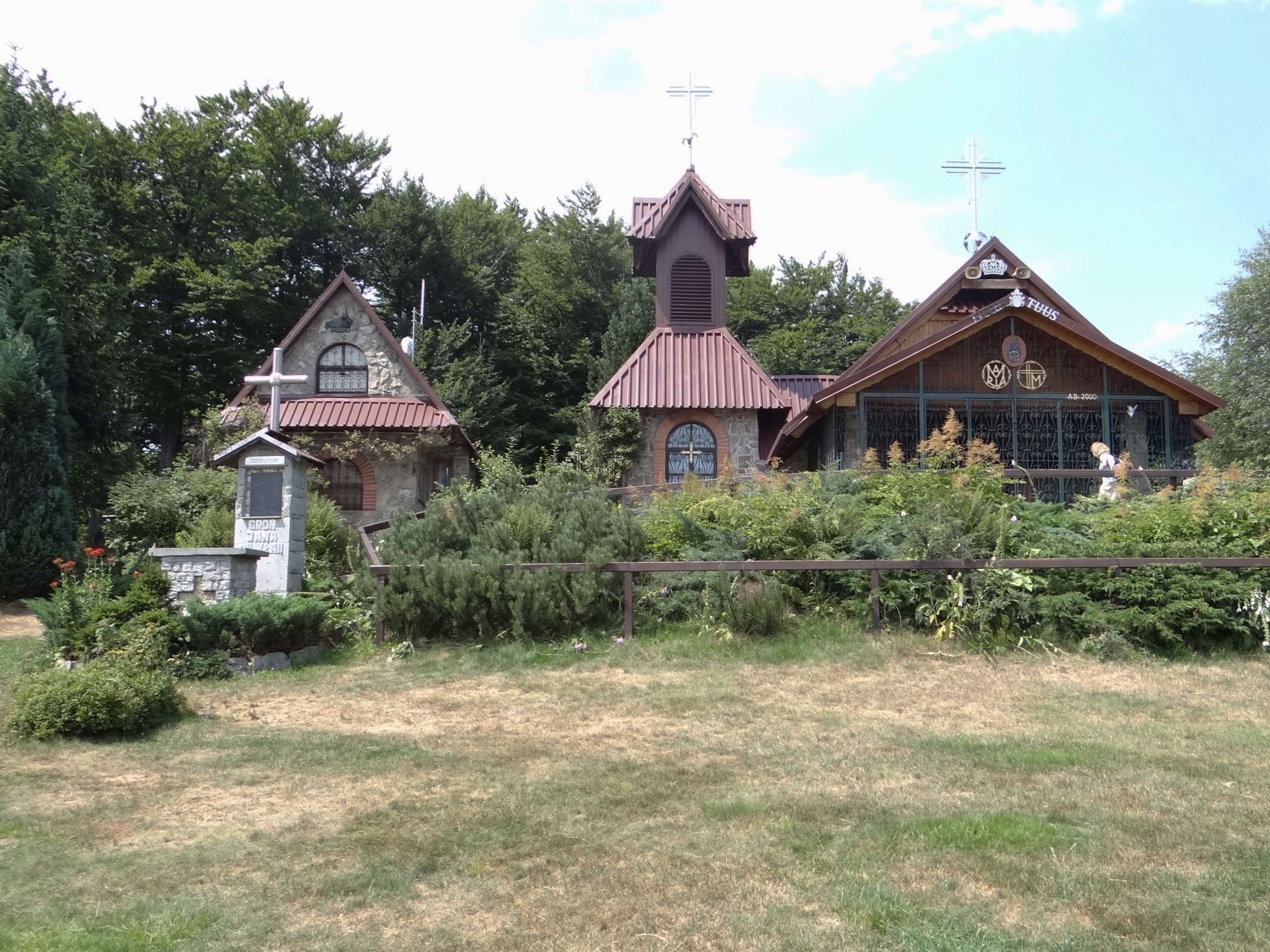 Groń Jana Pawła II